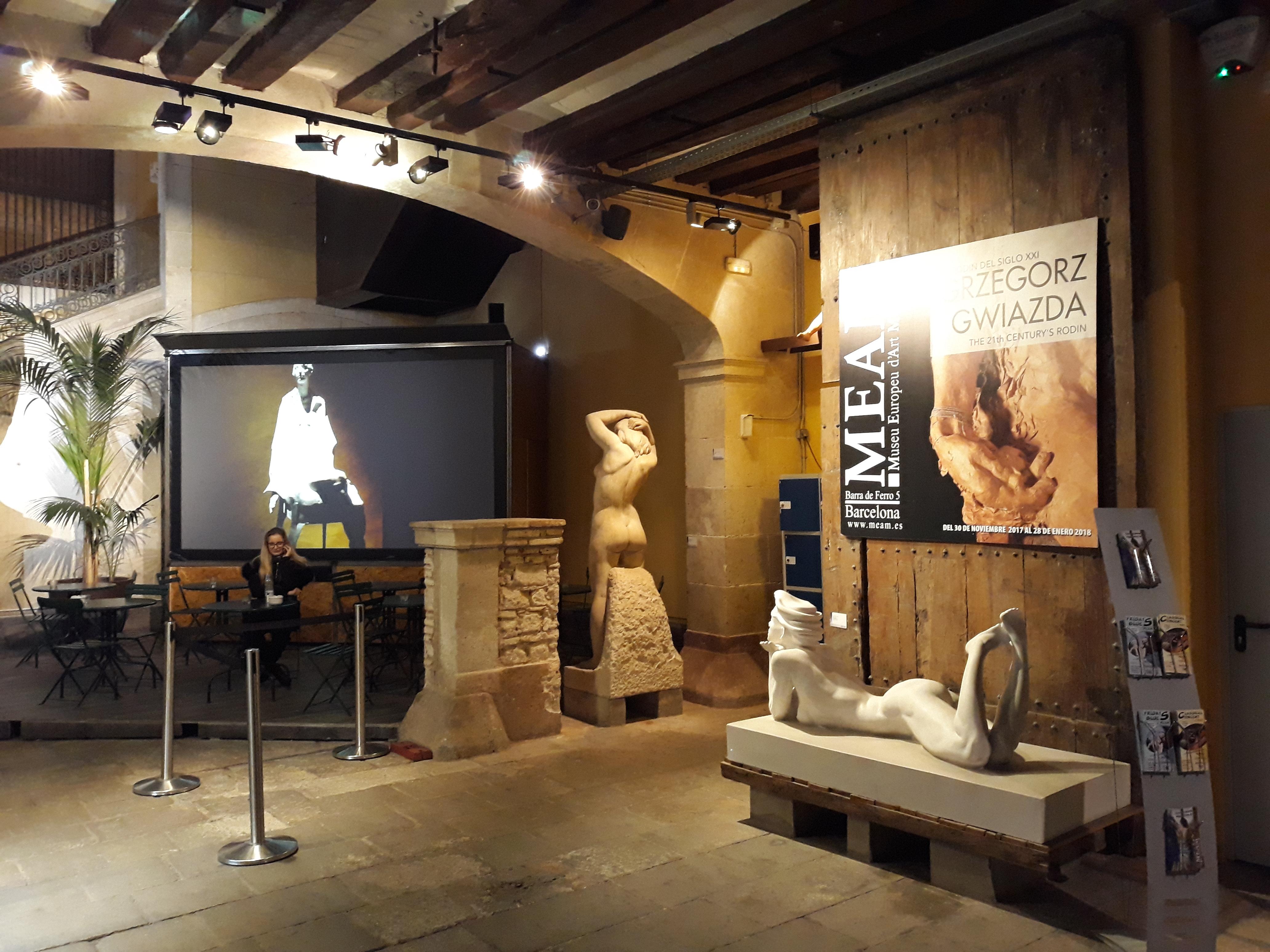 Museu Europeu d'Art Modern al carrer Barra de Ferro de Barcelona